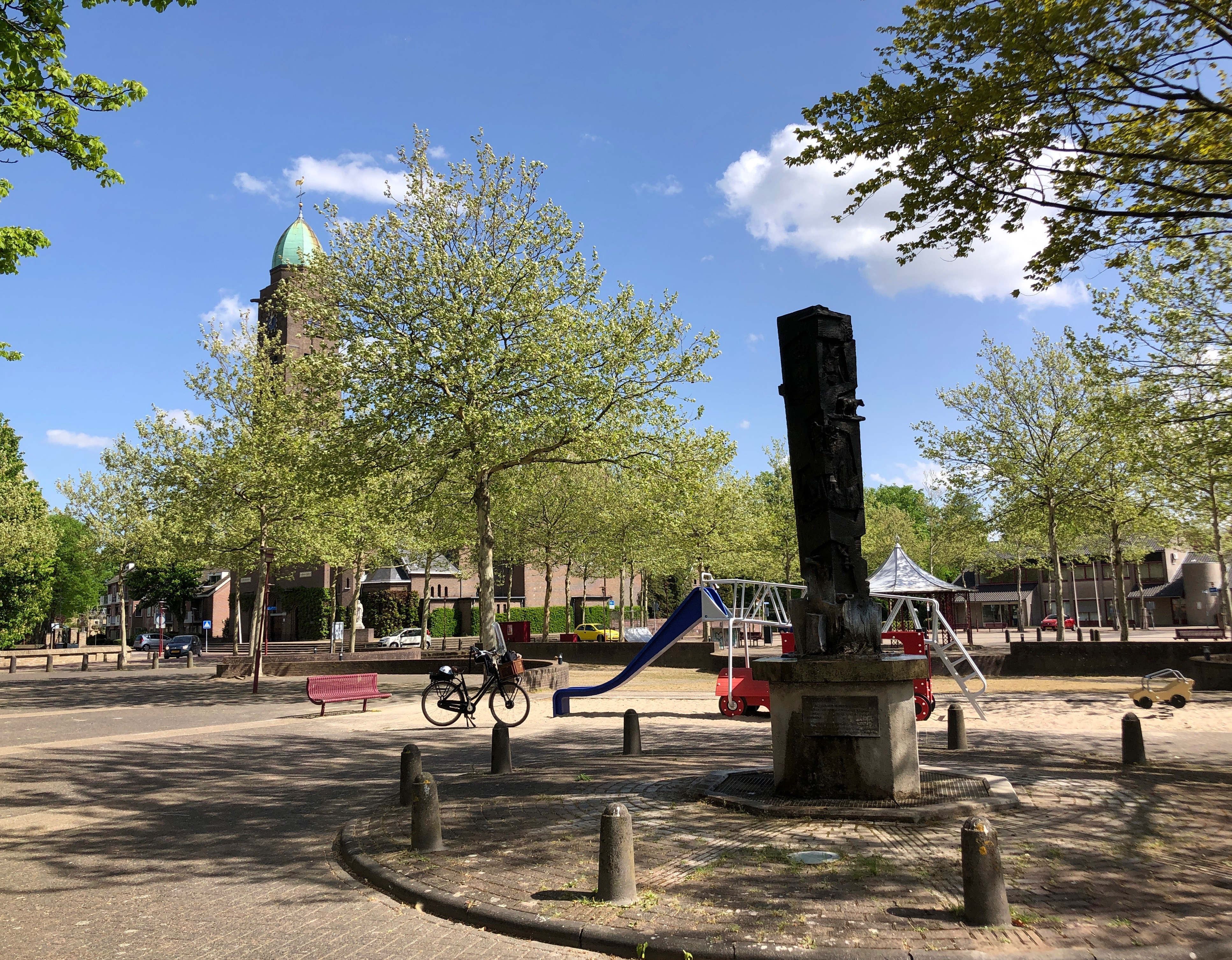 Zicht op een deel van het Willem Alexanderplein in Teteringen